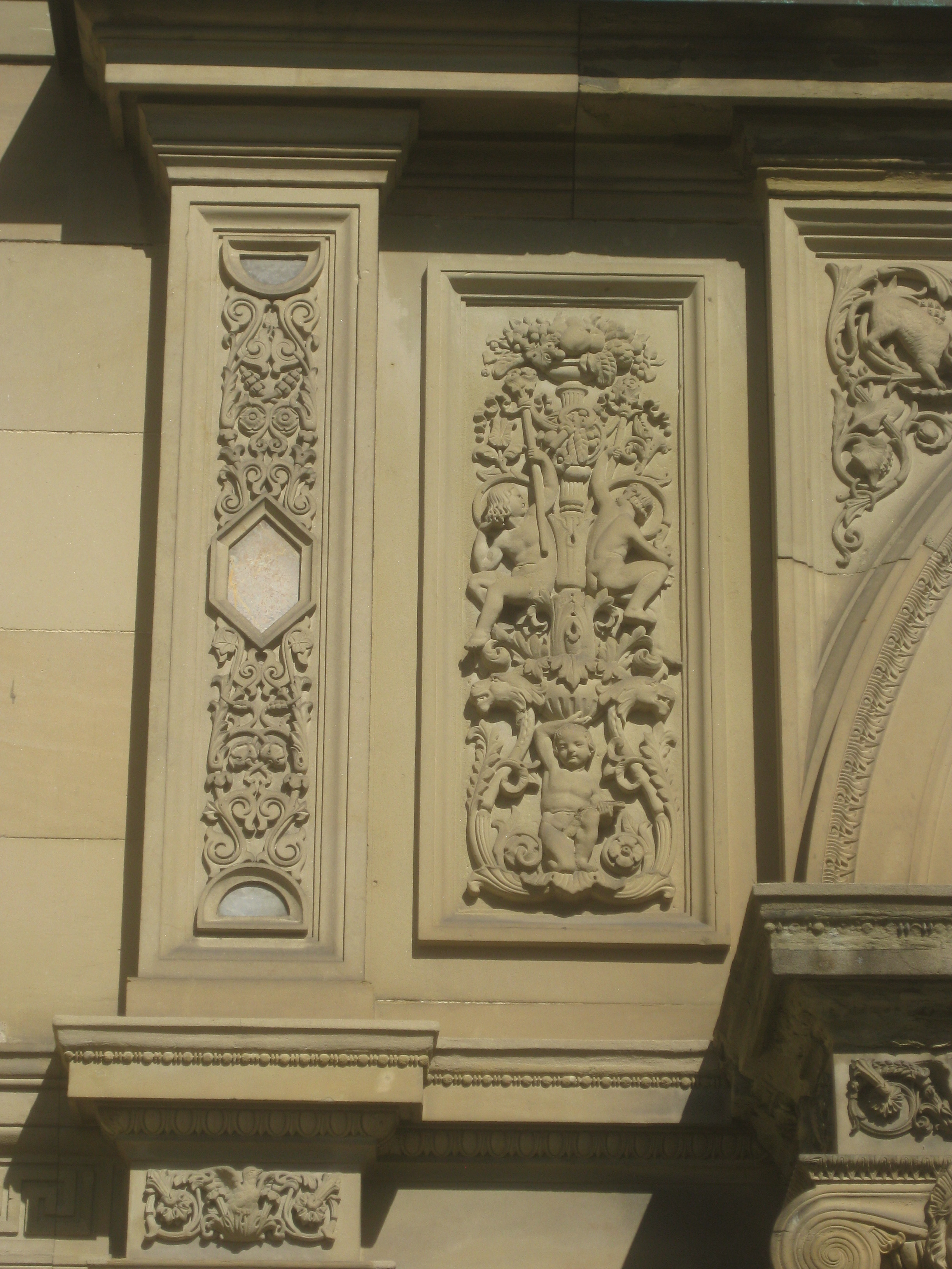 Stuttgart, Villa Berg, Südfassade, Füllung Füllung 3 (Zählung von links nach rechts).